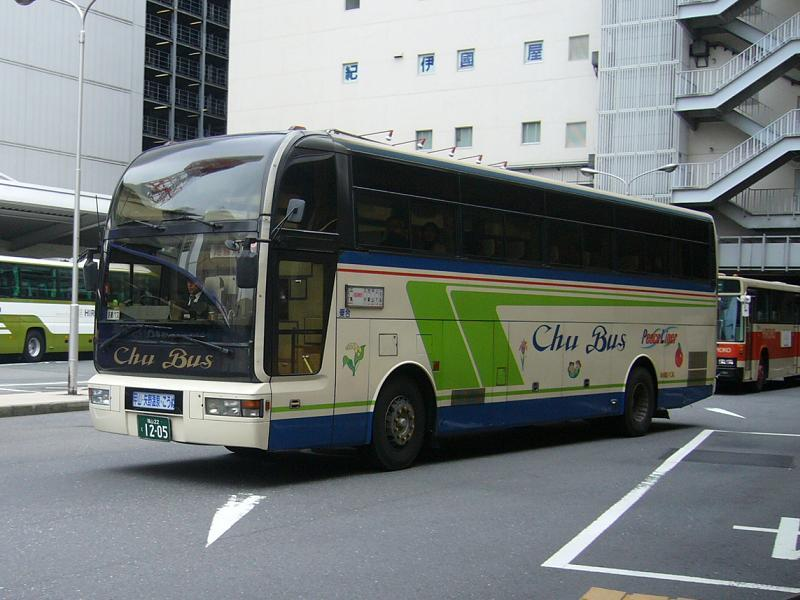 登録番号 福山22き12-05 中国バス所属 ピースライナー号用 2007年2月26日 広島バスセンターにて撮影